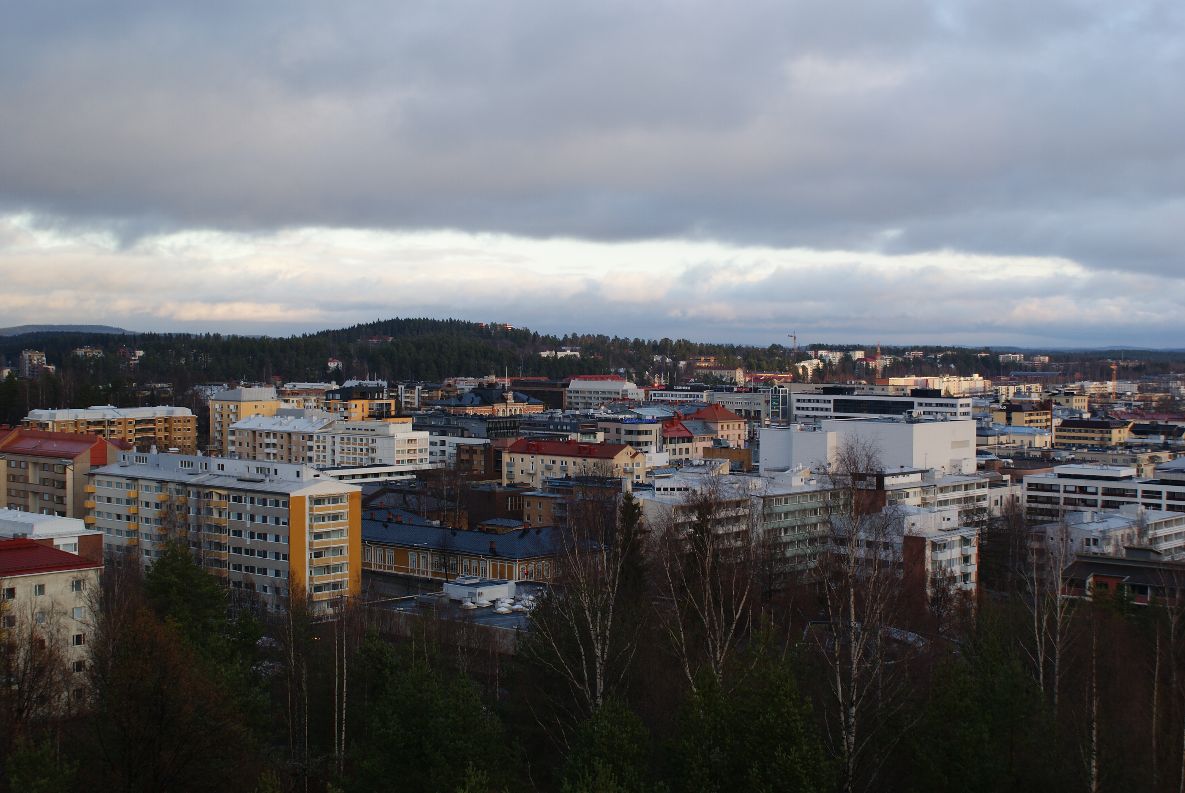 Kuopion keskustaa Mölymäeltä päin.